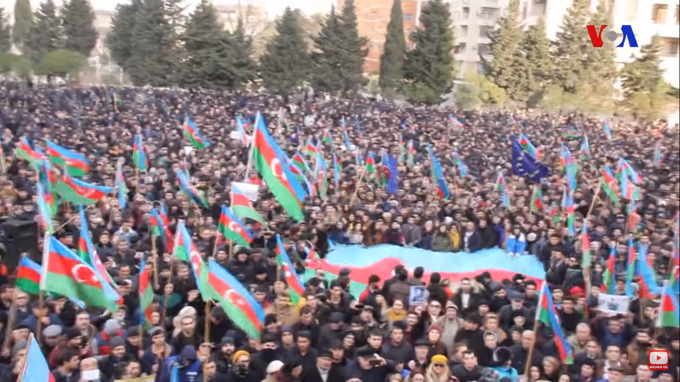 19 yanvar mitinqi